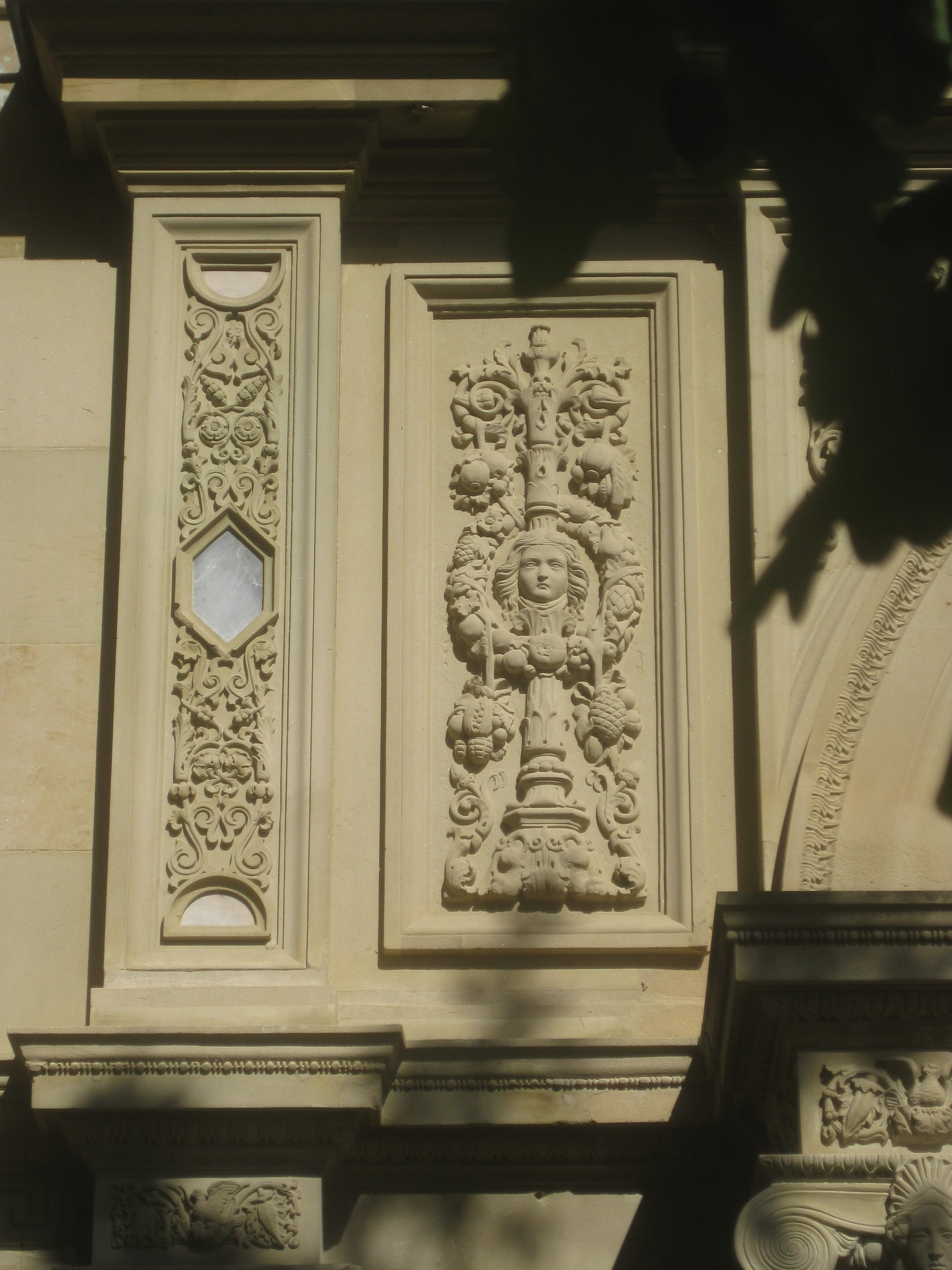 Stuttgart, Villa Berg, Südfassade, Füllung Füllung 1 (Zählung von links nach rechts).